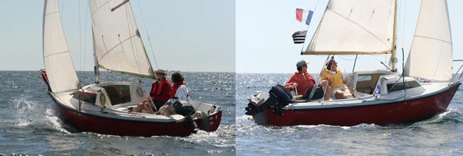 Deux tabascos pris au près le 3 août en baie de Concarneau